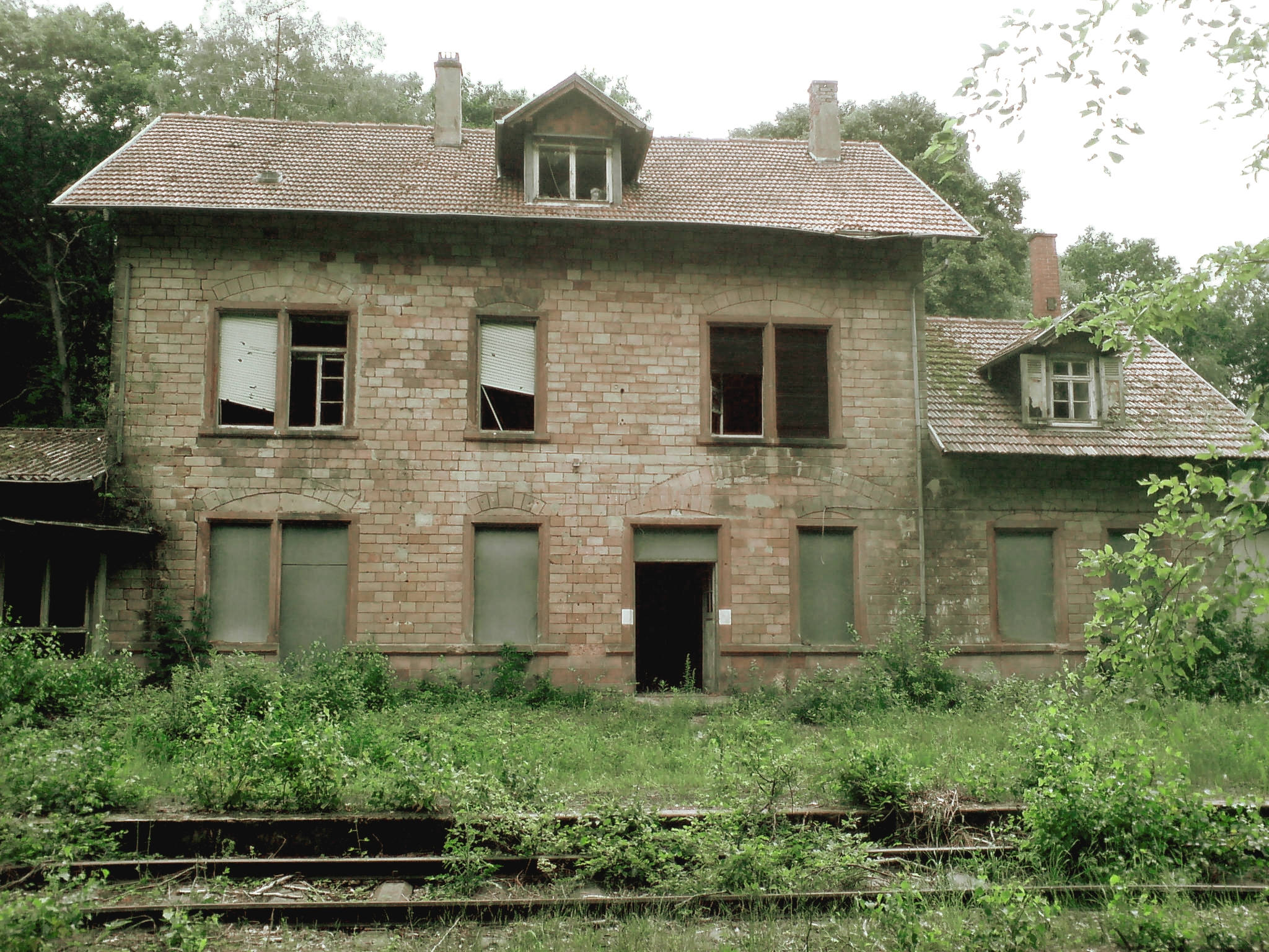 Jägersburger Bahnhof Frontalansicht von den Gleisen.